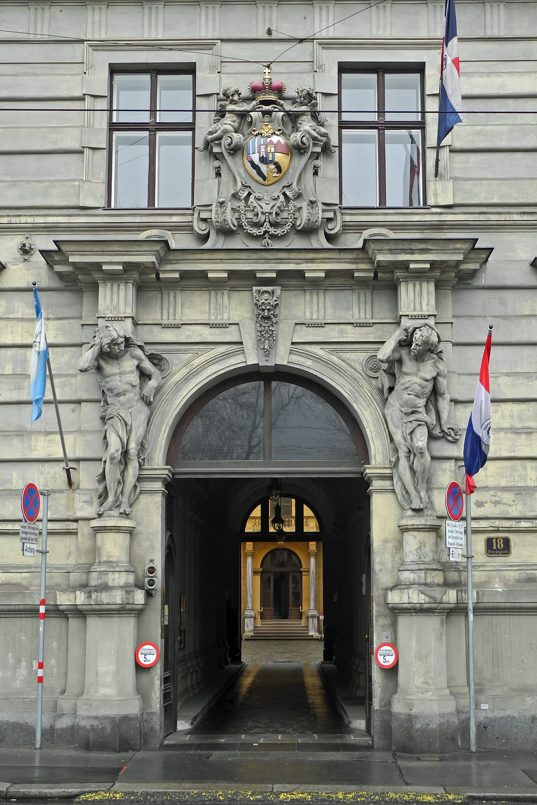 Wien – Stadt-Palais, Prinz-Eugen-Str. 18, Portal mit Schwarzenberg-Wappen